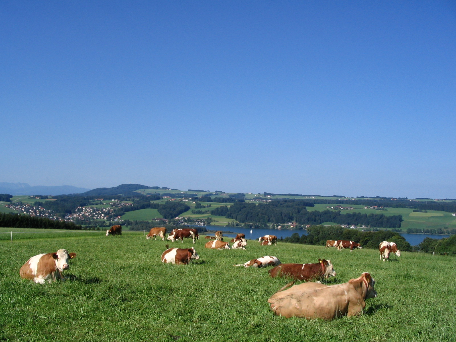 Obertrumersee, Salzburger Land Austria Author: Lombardelli Year: 2004